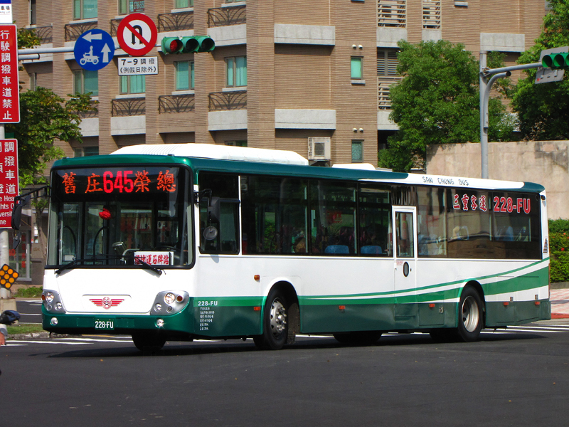 三重客運大宇BS120CN大客車228-FU，行駛臺北市聯營公車645線。